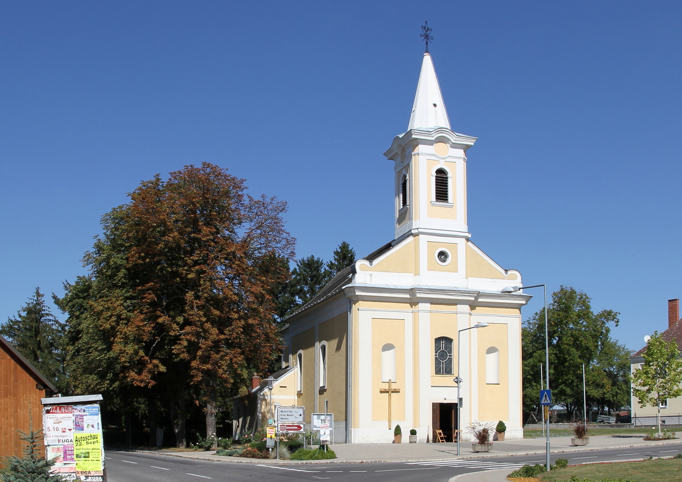 Katholische Pfarrkirche hl. Andreas in Kroatisch Geresdorf, ein Ortsteil der burgenländischen Gemeinde Nikitsch. Ein einfacher Bau aus dem Jahr 1795 mit eingebundenem Fassadenturm und eingezogenem Chor.